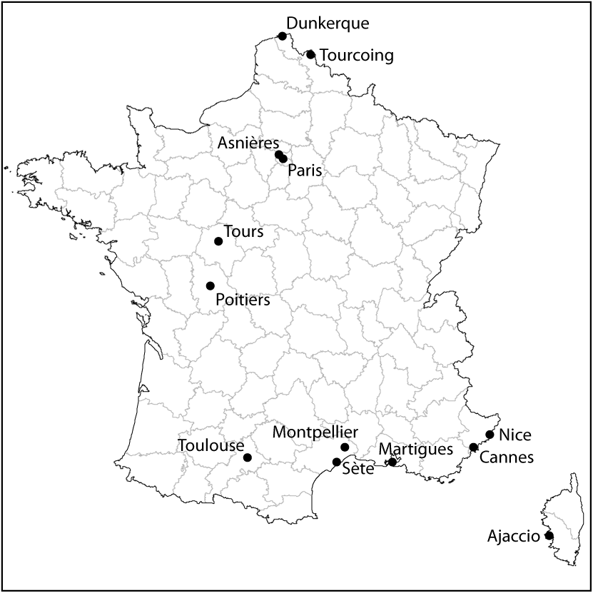 Carte des clubs engagés dans le championnat de France Pro A de volley-ball 2001-2002